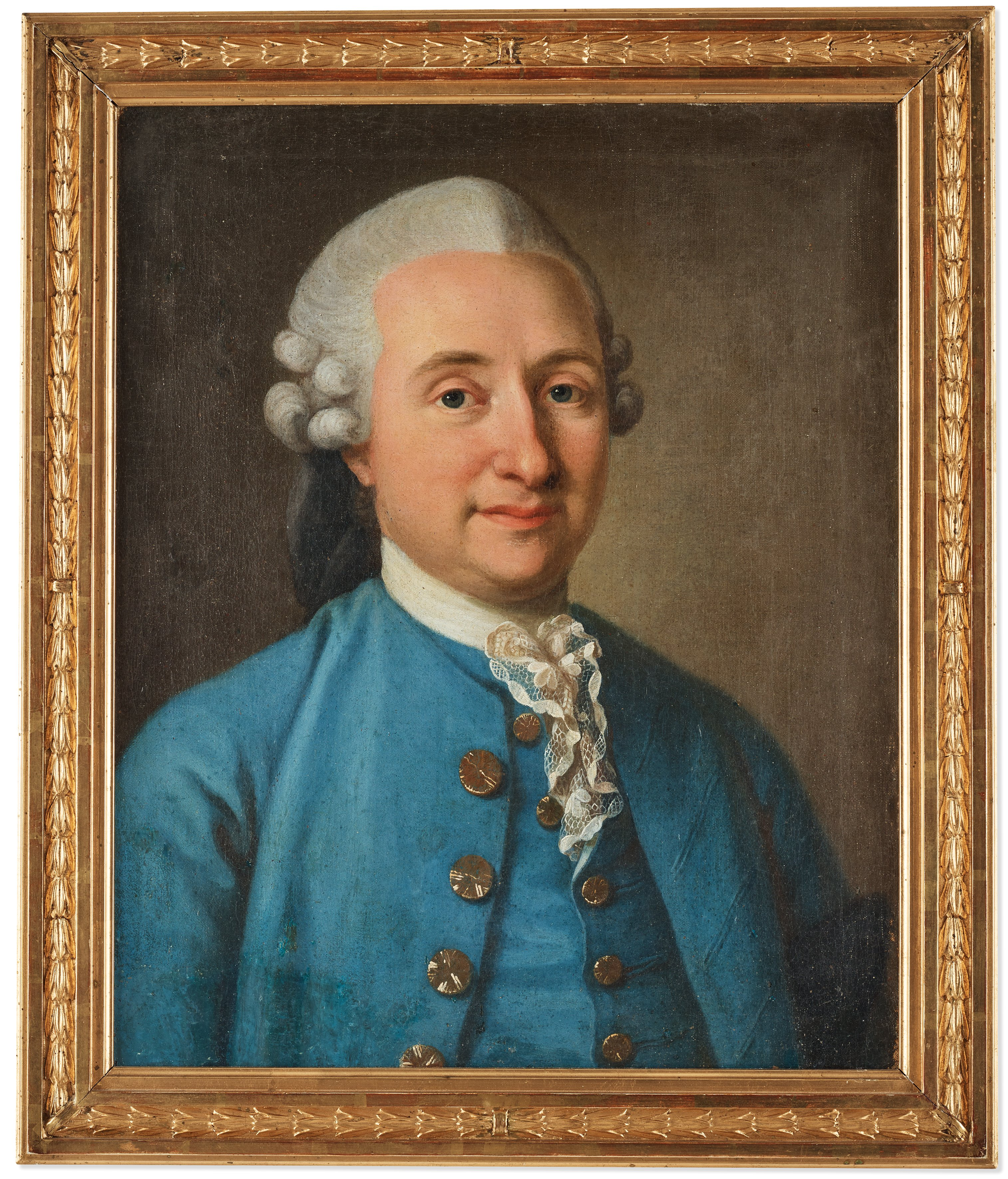 Medicine doktoer Johan Lorentz Odhelius (1736-1816), troligen avporträtterad av Ulrica Pasch ca 1775.